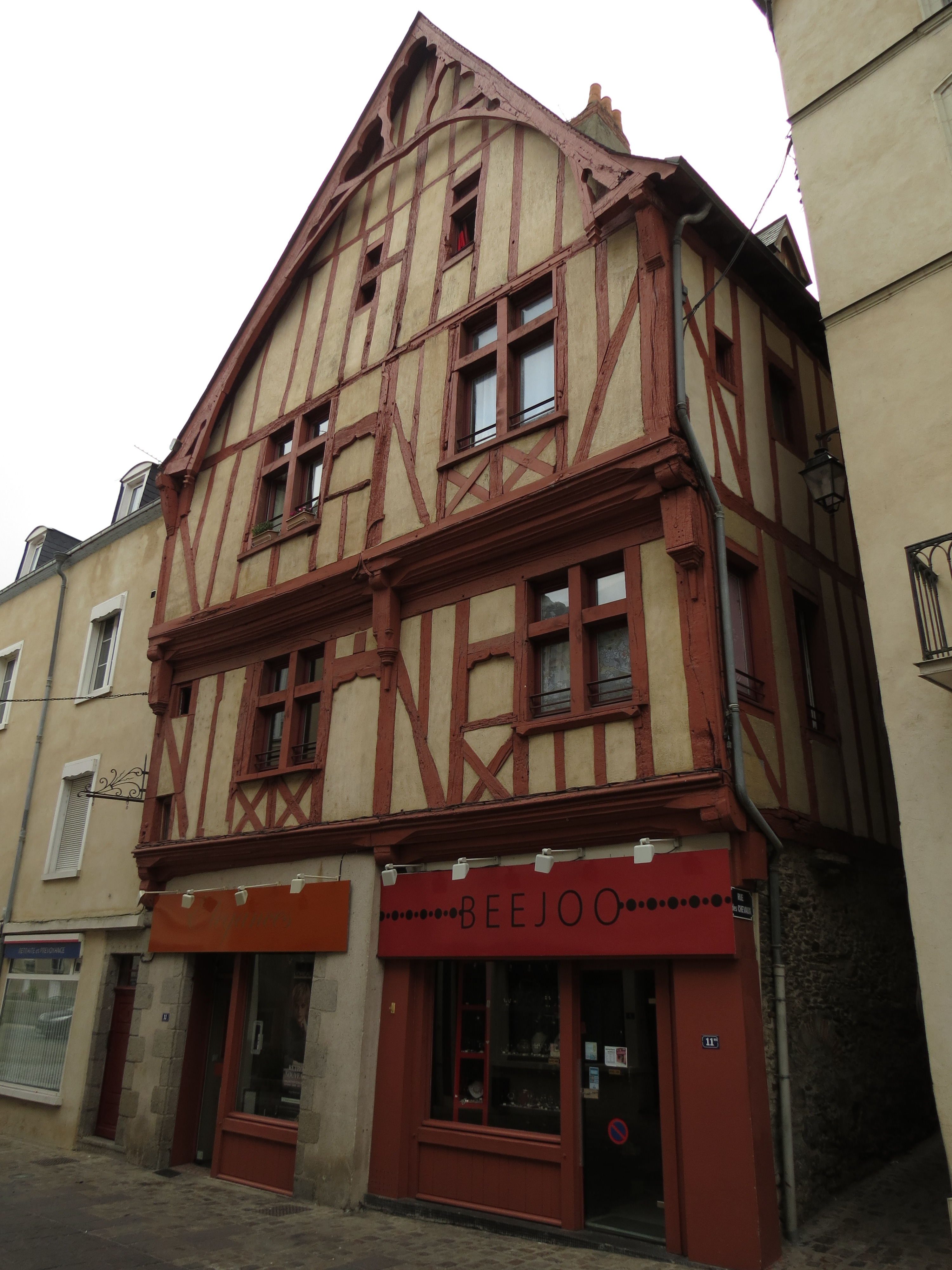 9 Grande-Rue, Laval, Mayenne, Pays de la Loire.